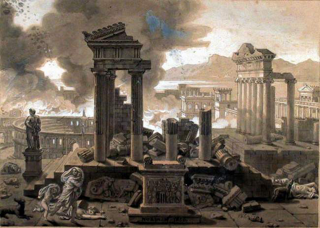 Herculanum détruit par l'éruption du Vésuve